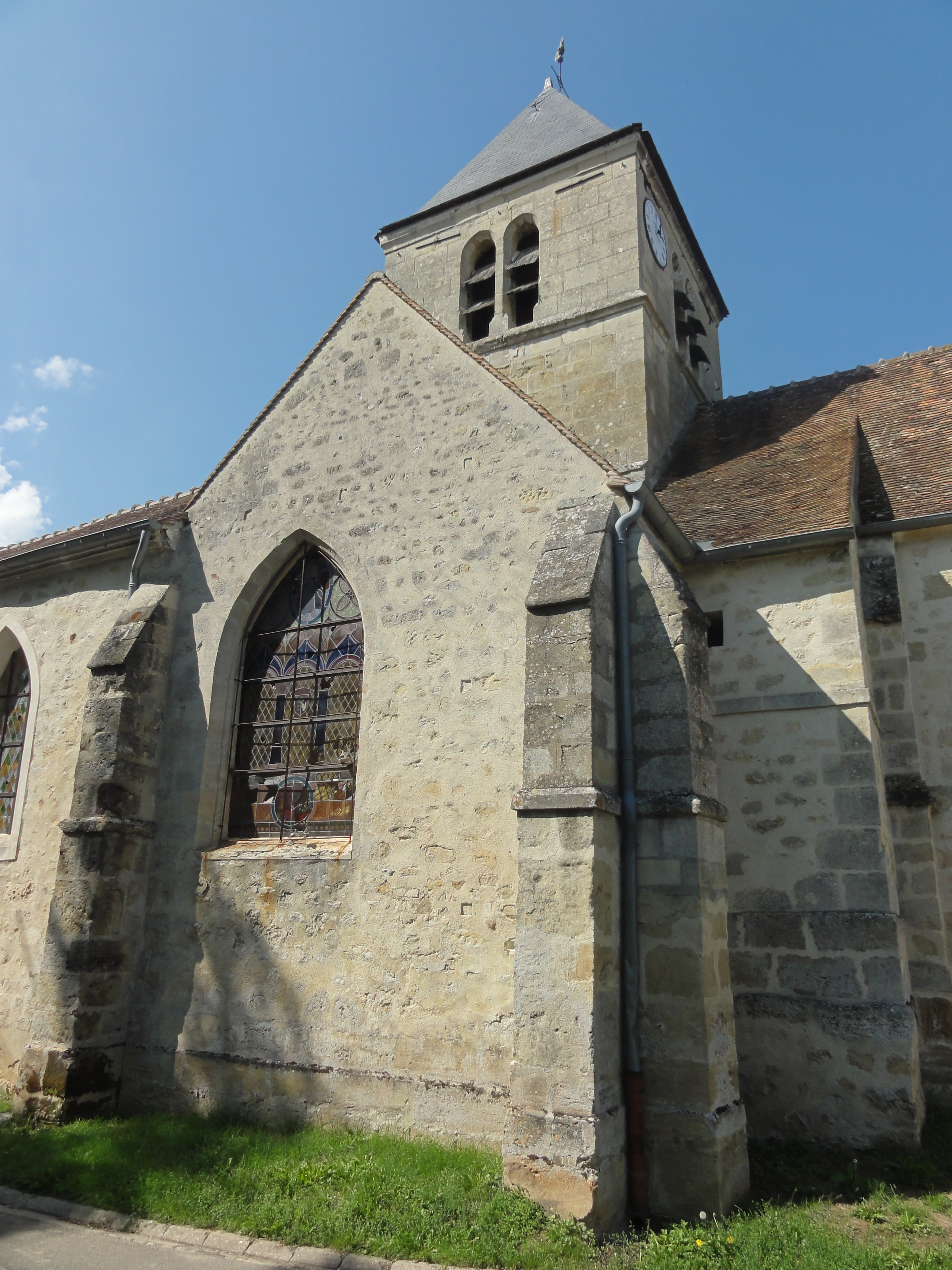 Église Sainte-Marie-Madeleine du Perchay - voir titre.